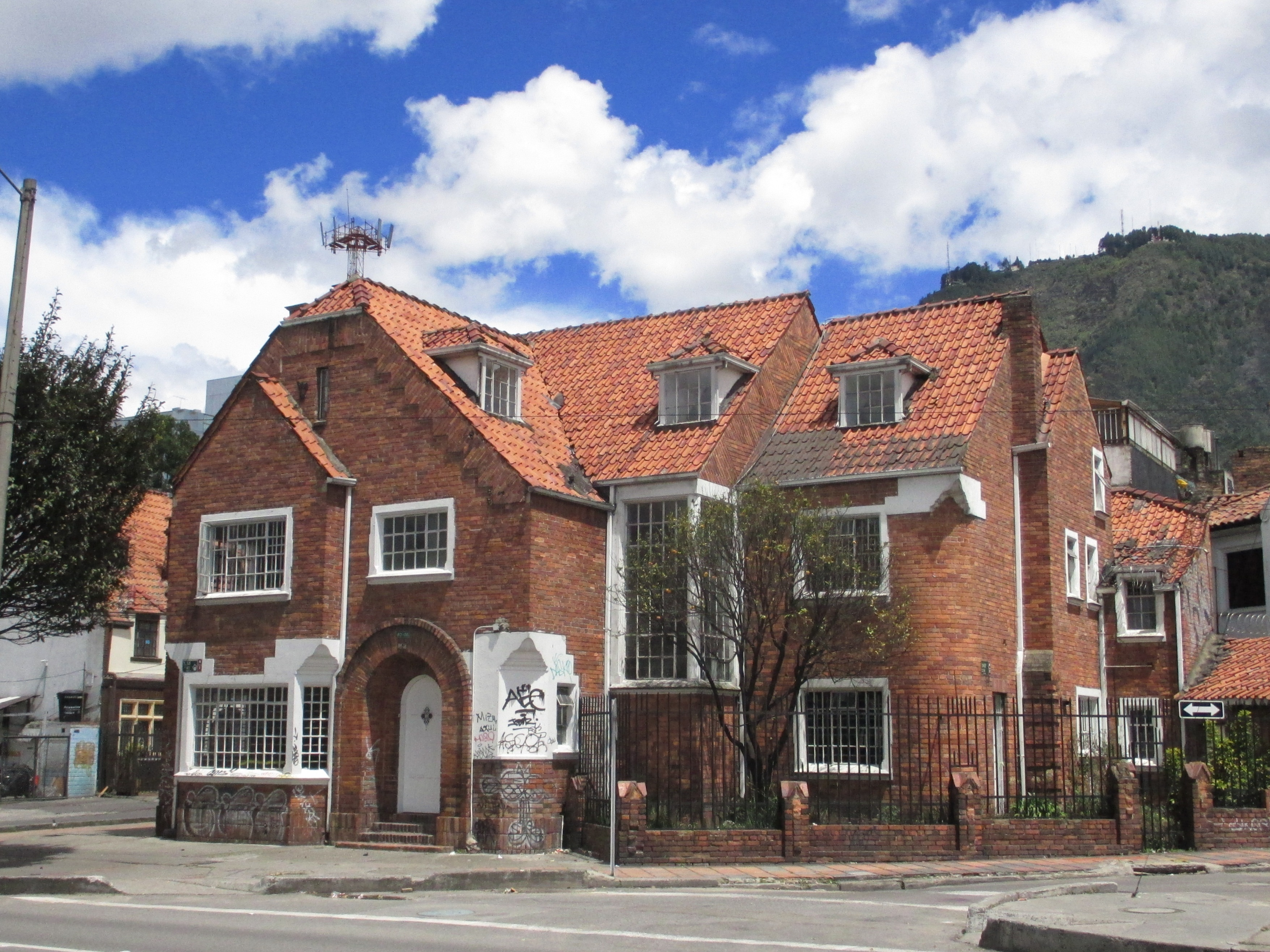 Avenida Caracas calle 40 A Casa de ladrillo